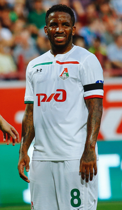 Дебютный гол Смолова принес победу «Локомотиву» над «Анжи»